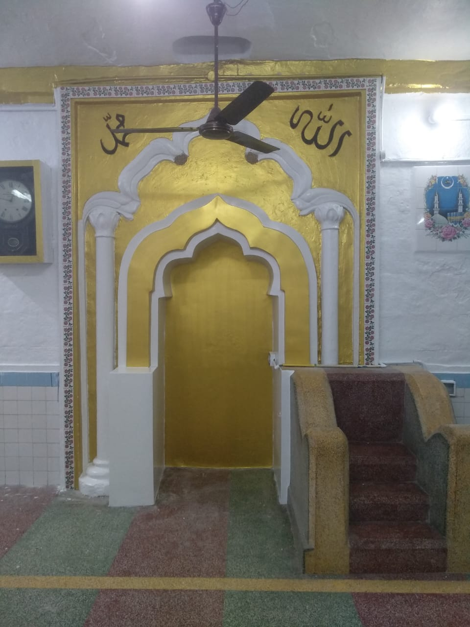 காஜிமார் பள்ளிவாசல் மிம்பர் மெஹ்ராப்